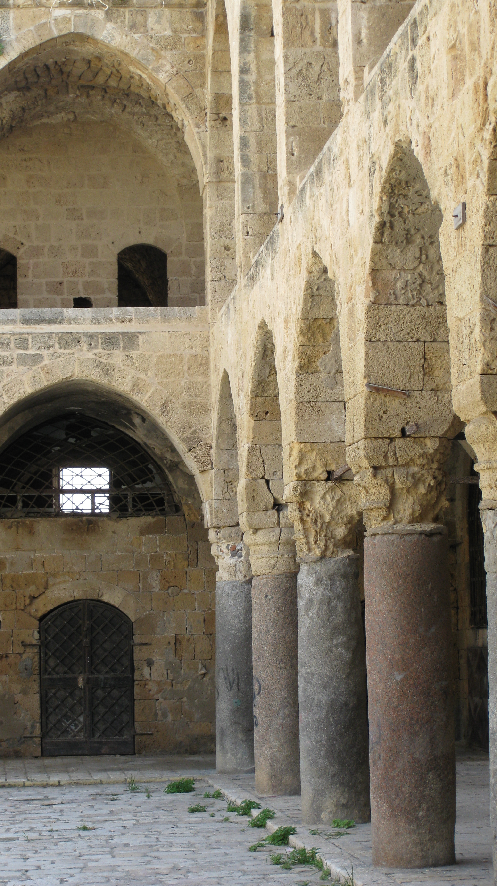 Acco (Acre, Akko) - Khan al-Umdan עכו - חאן אל עומדאן